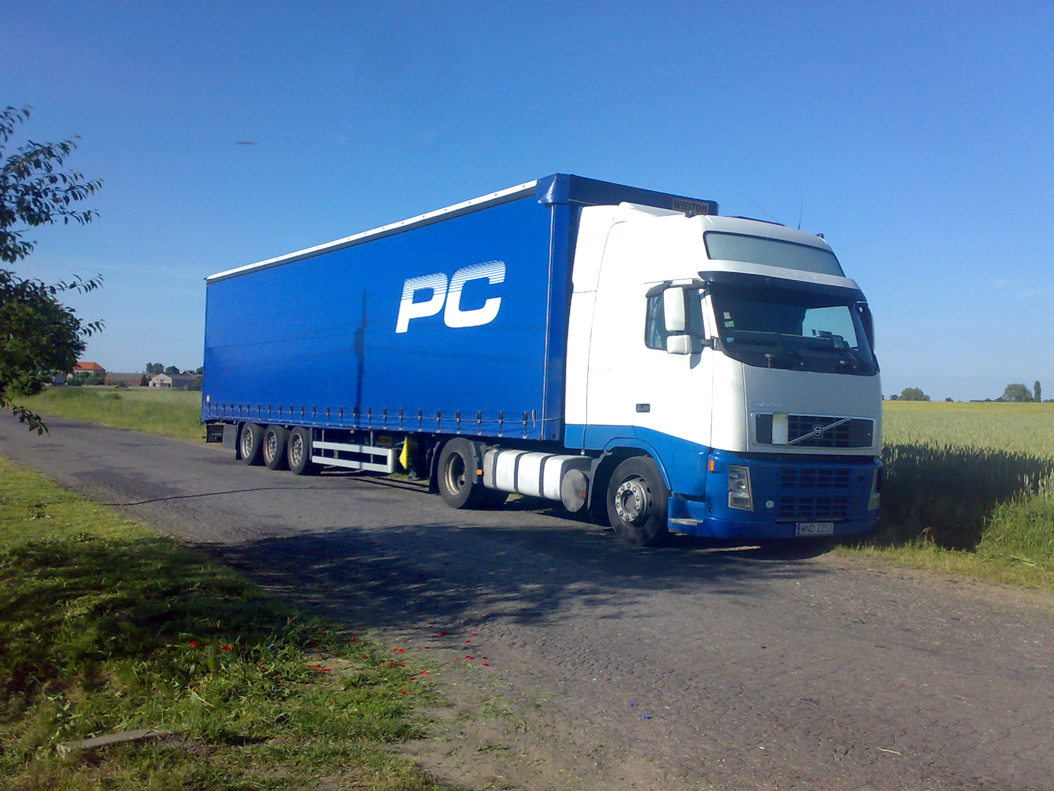 Volvo FH12